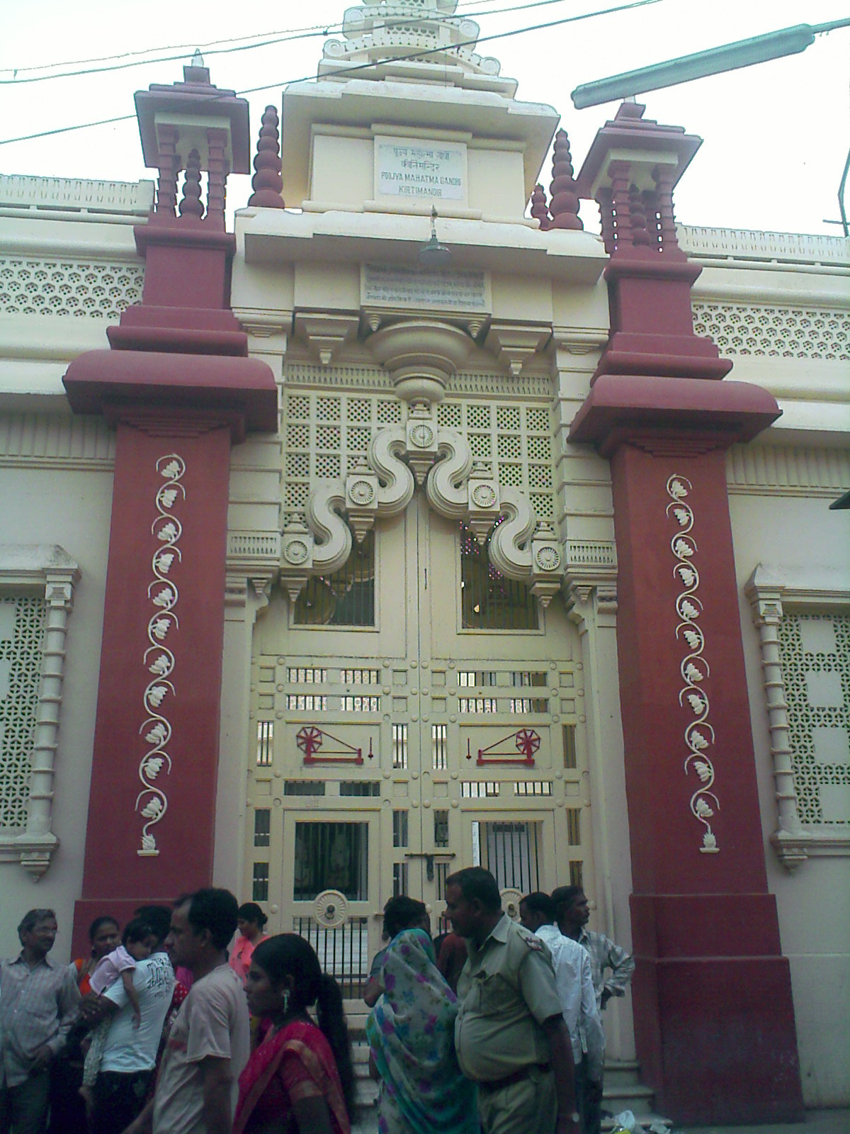 mahatma gandhi's house in porbandar